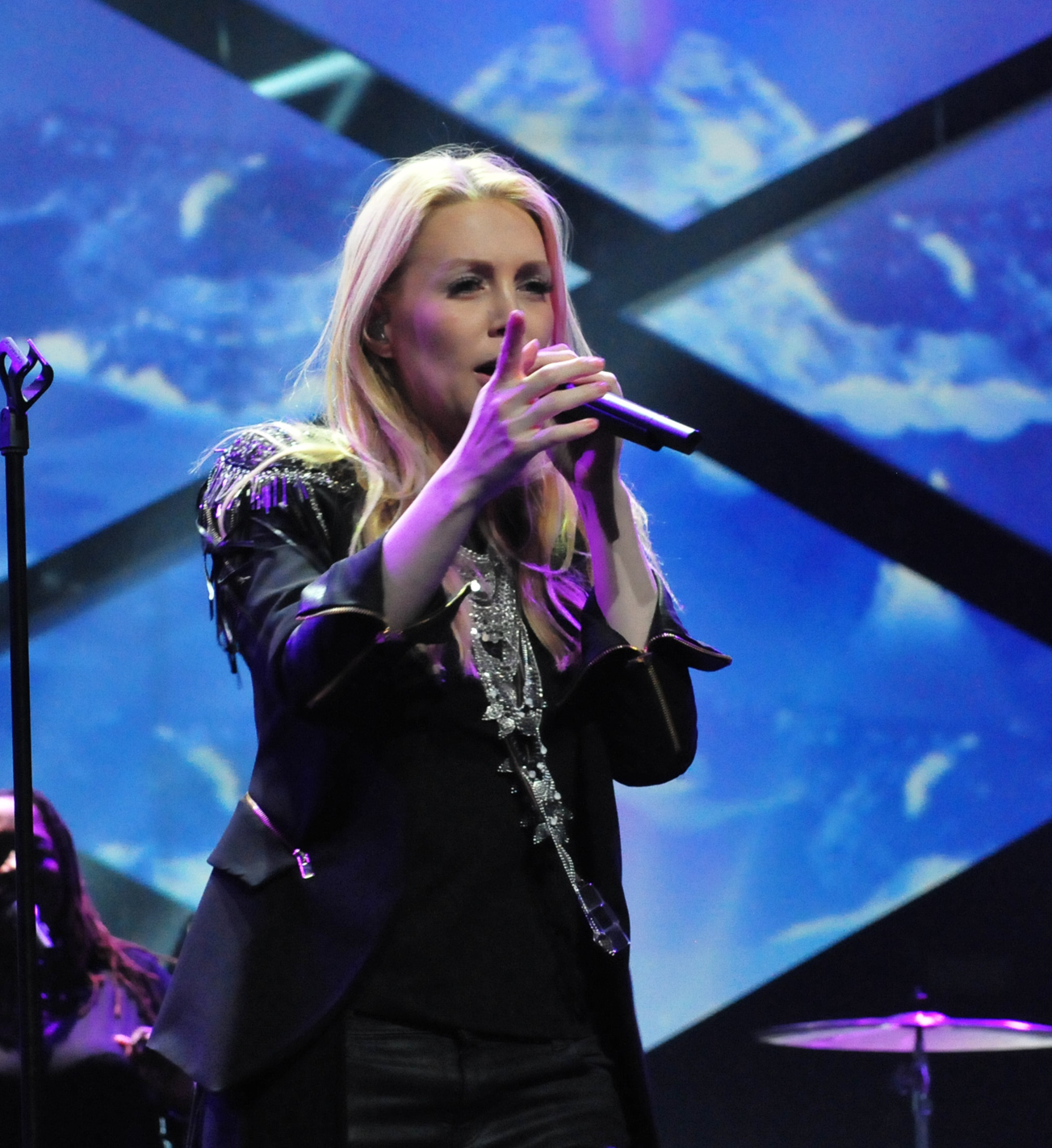 Alexa Feser, Unser Song für Österreich 2015, Probe und Pressekonferenz in Hannover